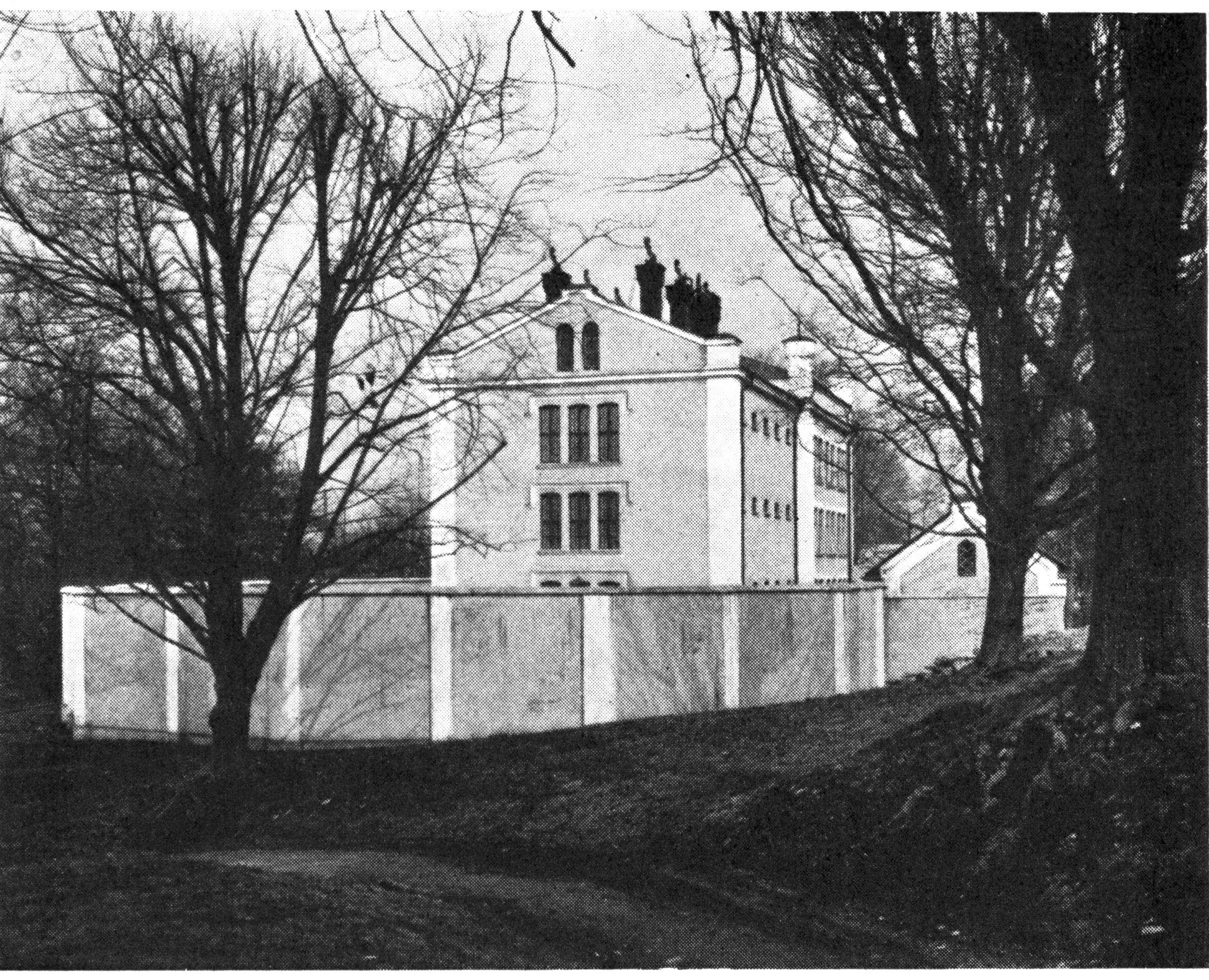 Kronohäktet i Visby